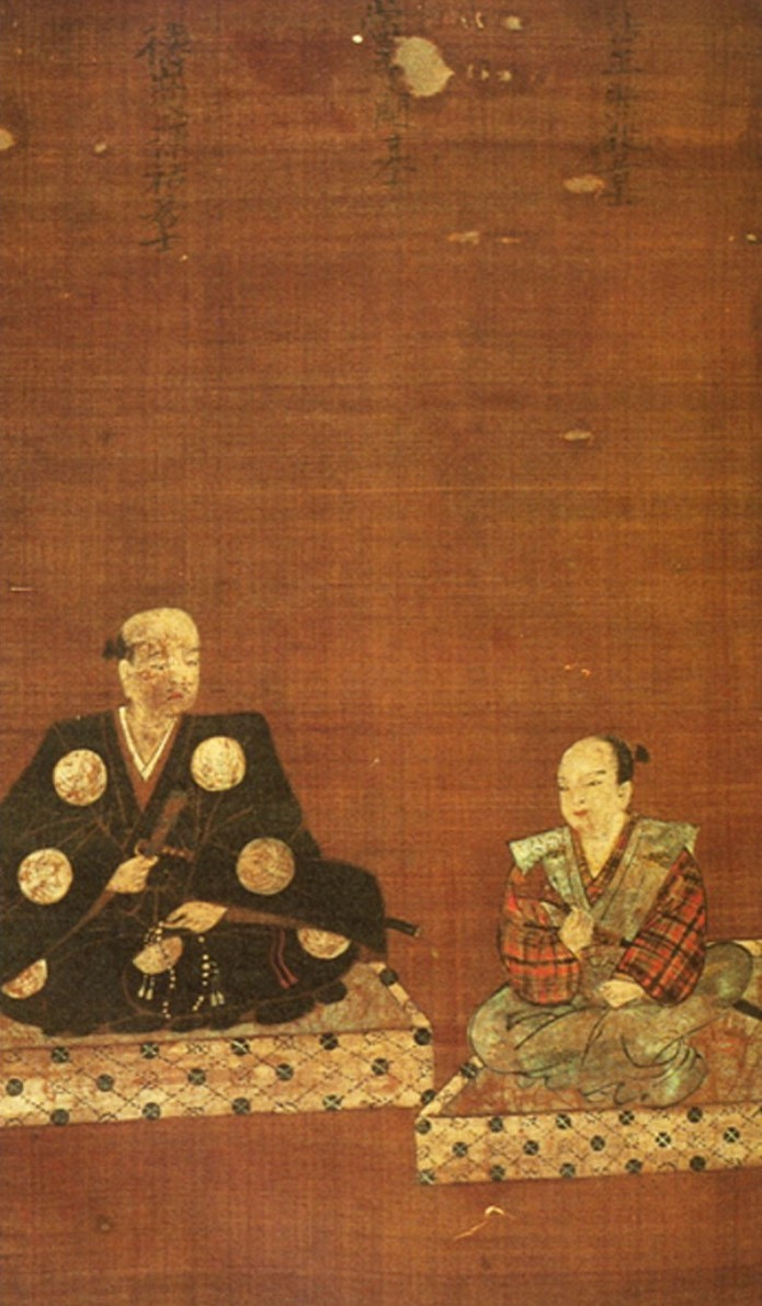 松本氏輔と子息の肖像。